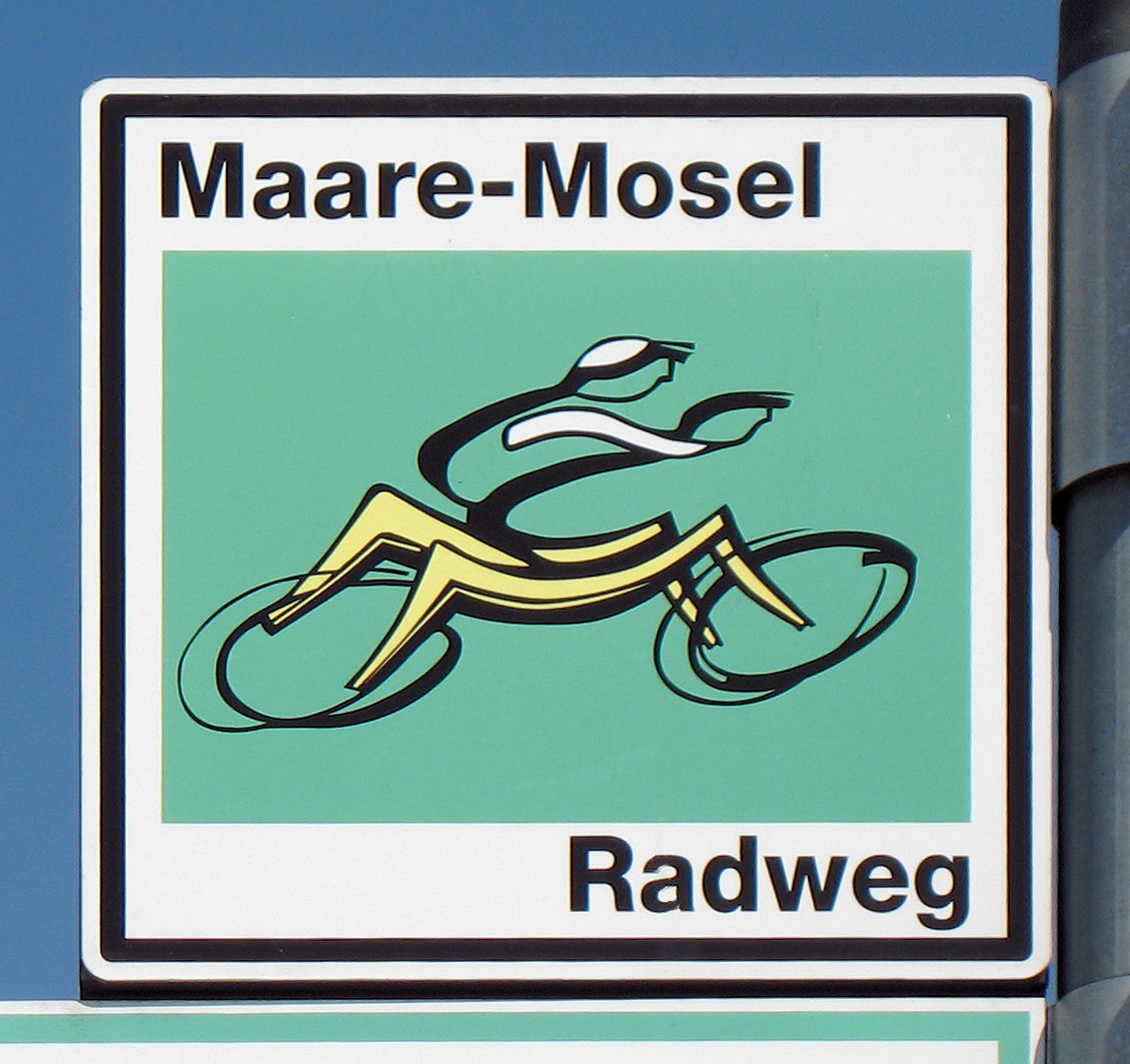 Beschilderung des Maare-Mosel-Radwegs